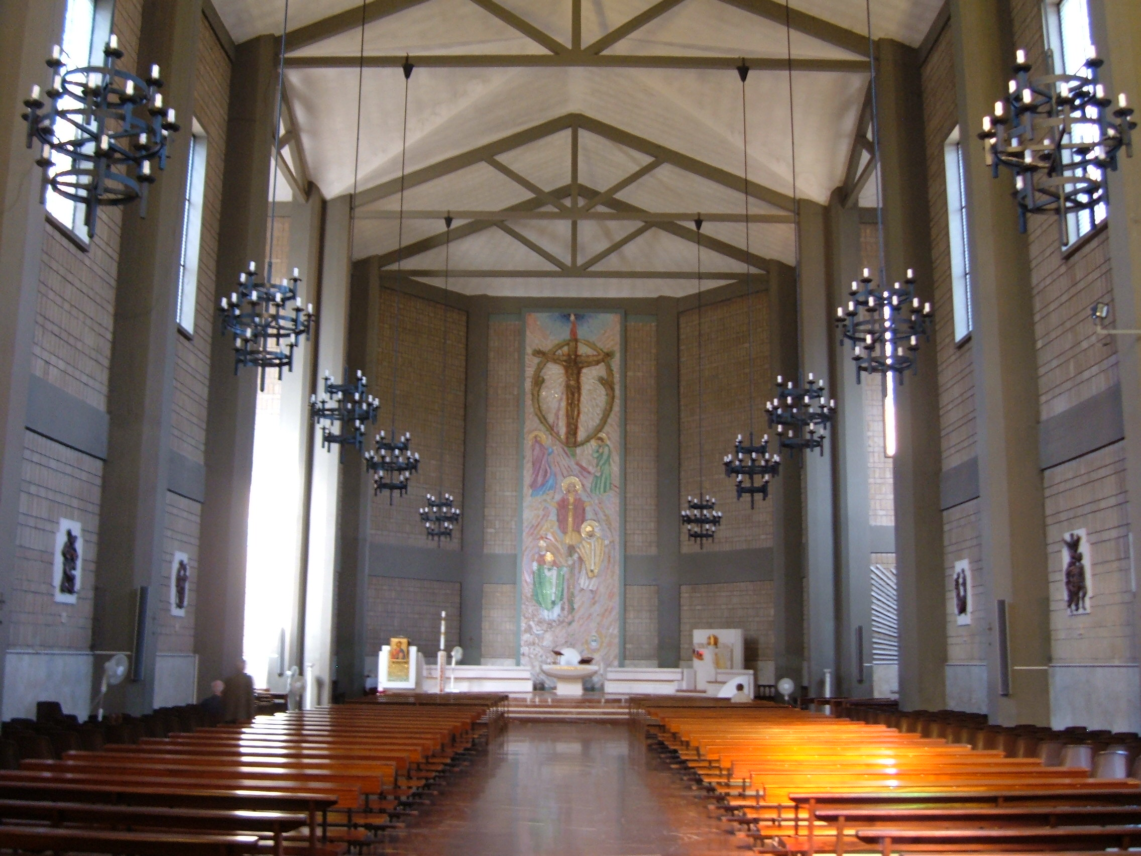 Chiesa di Santa Silvia, a Roma, nel quartiere Portuense.